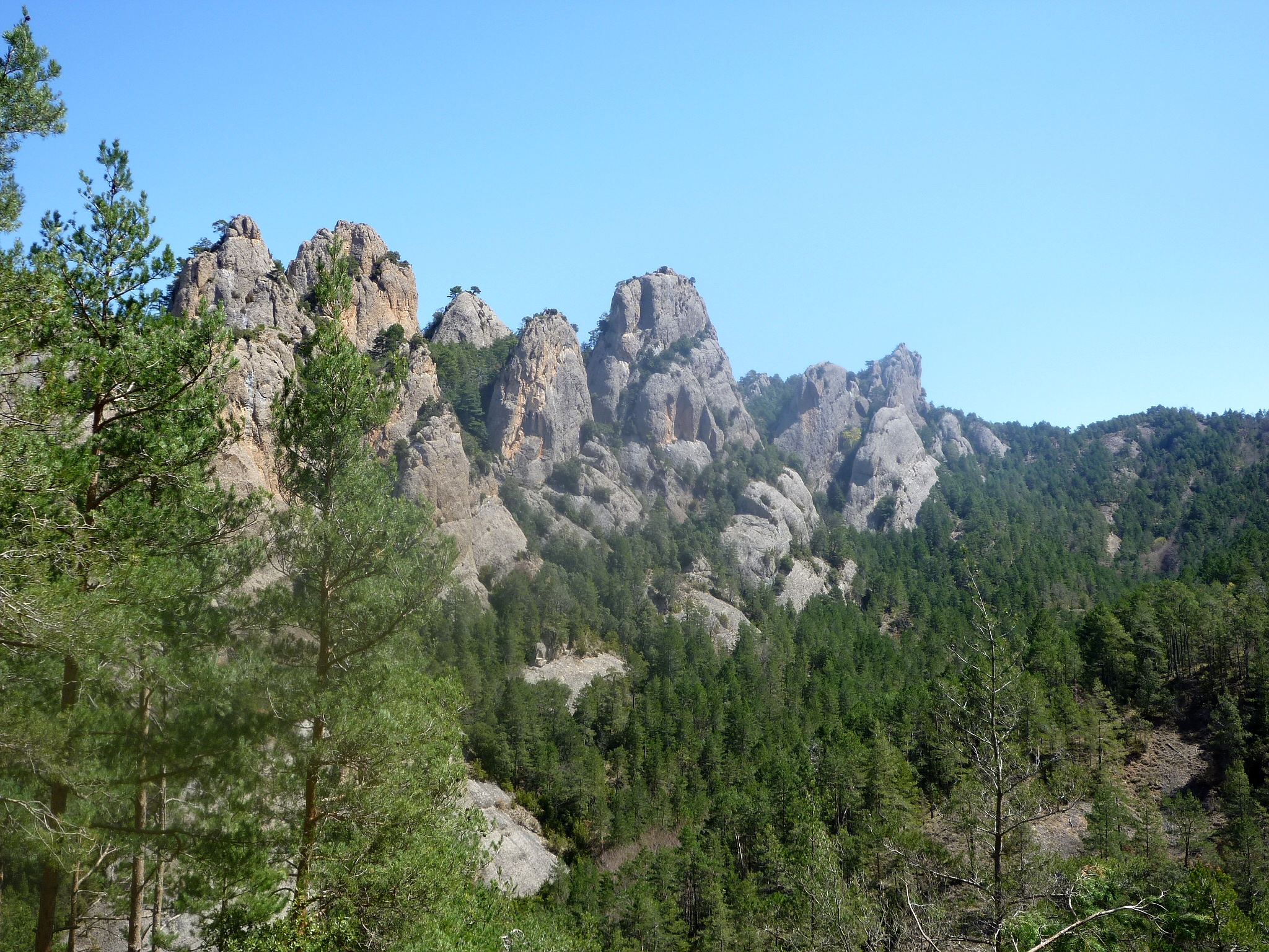 El Clot dels Llengots en la vertent que baixa del Coll de la Maçana. Al centre, aproximadament, es troba la masia dels Llengots. A la Serra dels Bastets, Guixers (Solsonès - Catalunya)